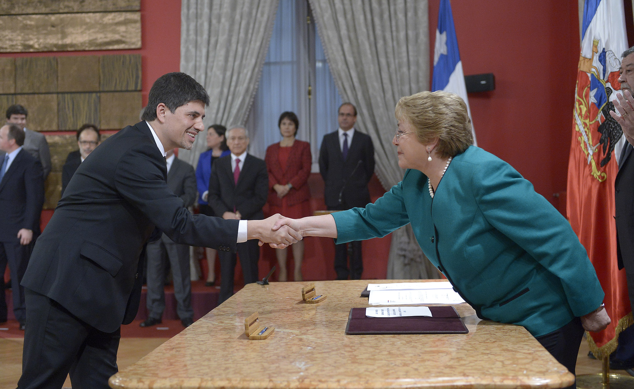 11/05/15 Cambio de Gabinete, Asume Ministro Marcelo Diaz.